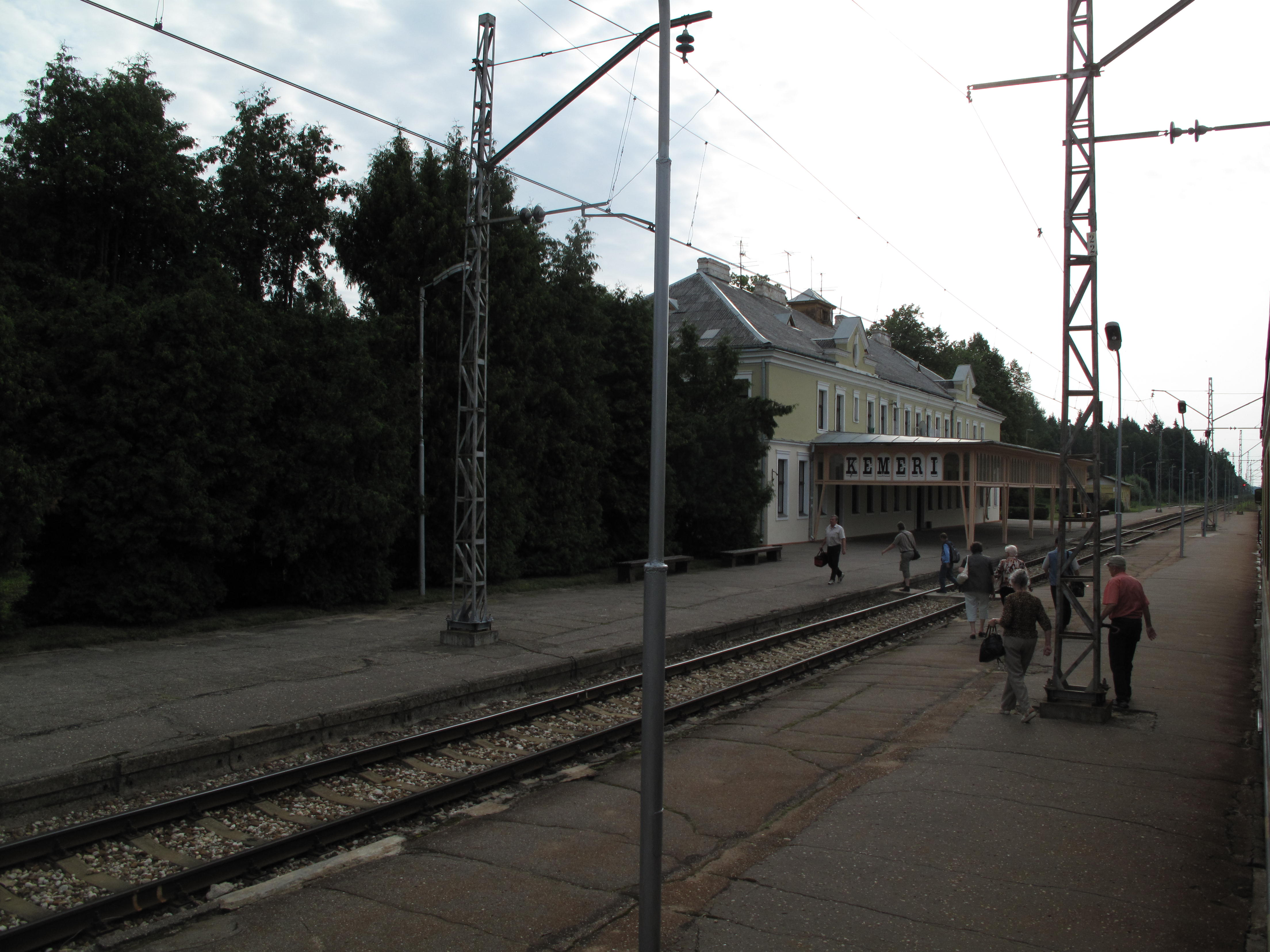 Ķemeri, železniční stanice